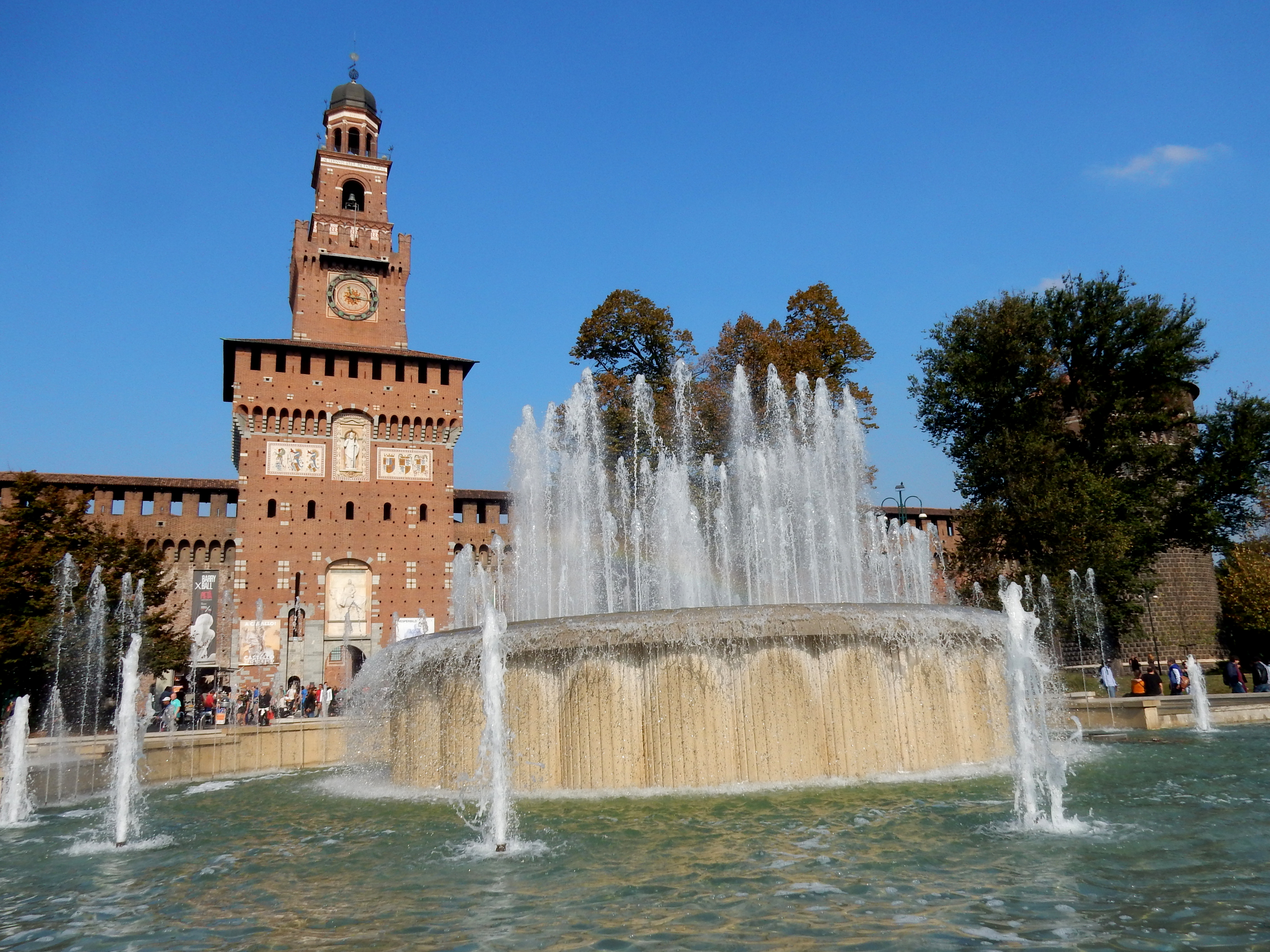 Castello Sforzesco This is a photo of a monument which is part of cultural heritage of Italy.